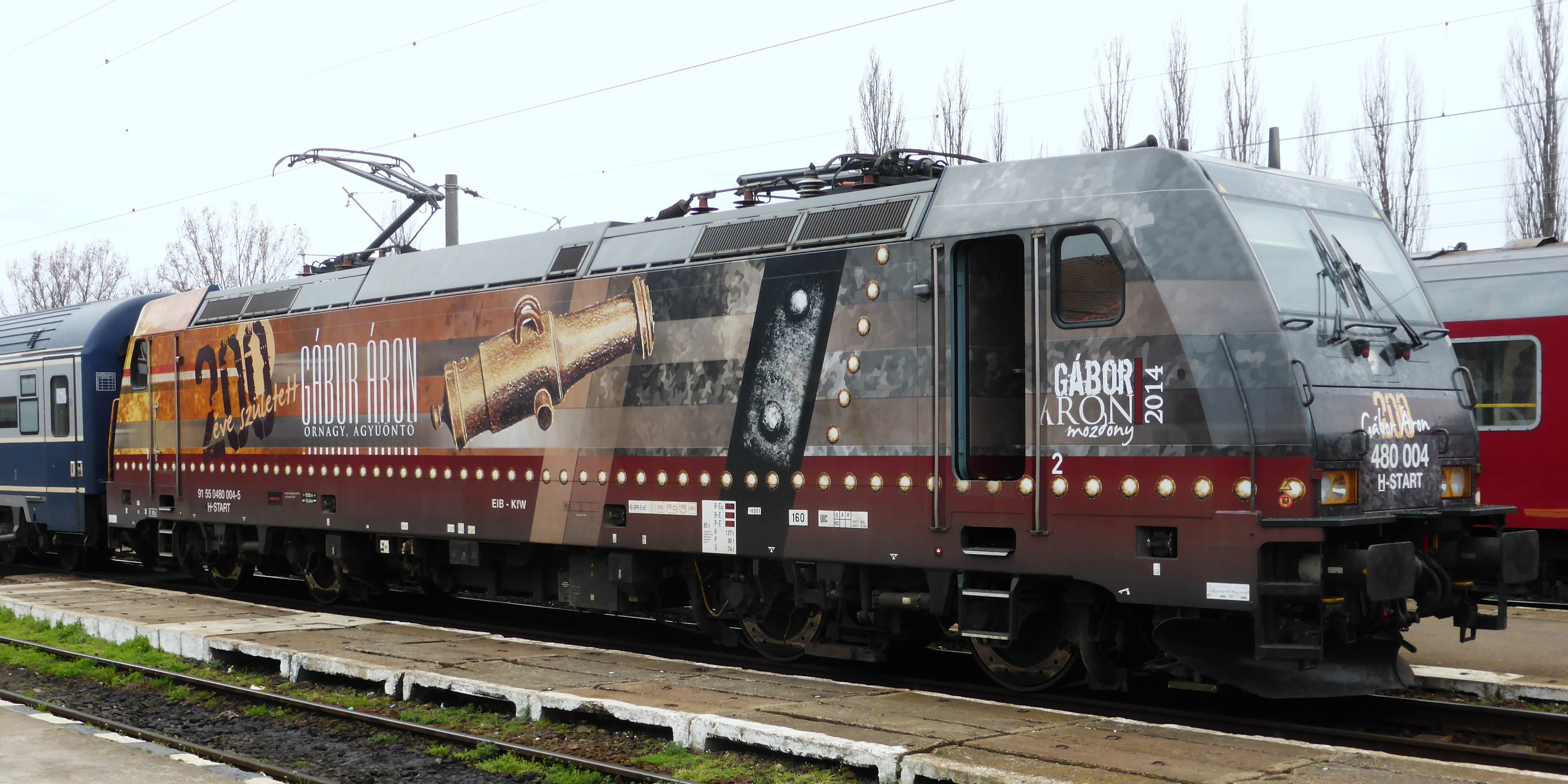 Ungarische Lokomotive zum 200. Geburtstag von Áron Gábor.